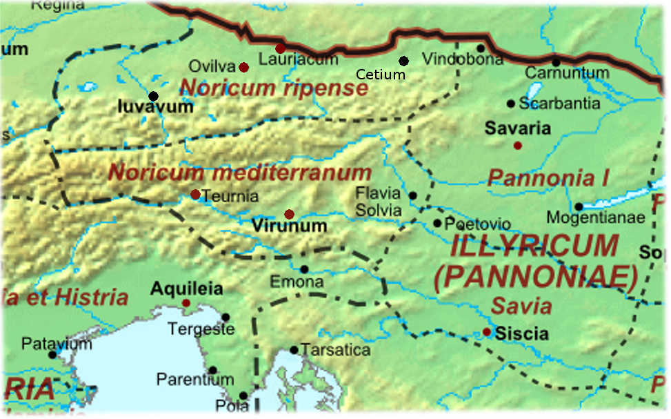 Die römischen Provinzen Noricum ripense (Ufernorikum) & Noricum mediterraneum (Binnenorikum) um 400 n.Chr.